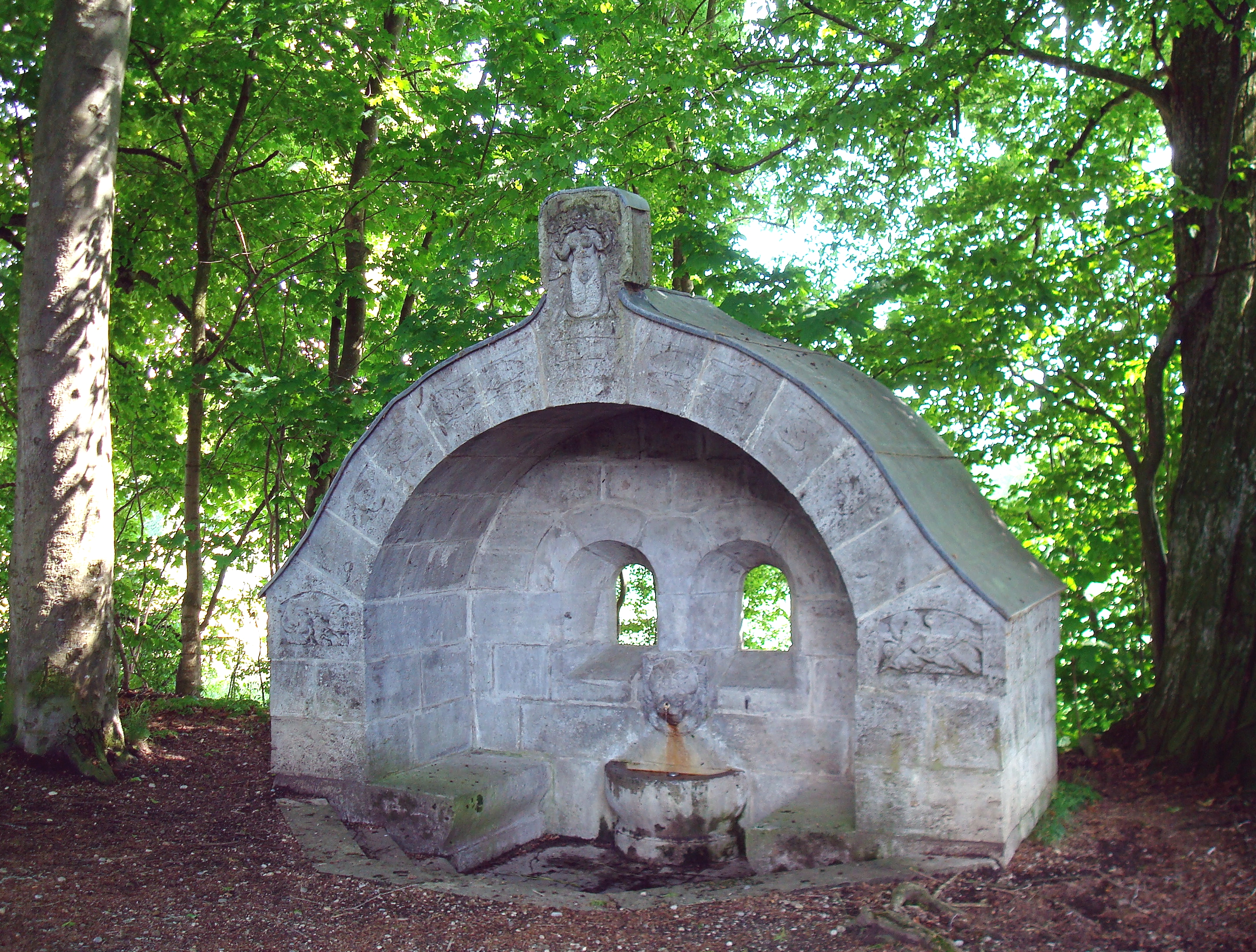 Berg am Starnberger See, OT Assenhausen, Brunnenhaus am Bismarckturm mit Bildhauerarbeiten von Georg Wrba, 1899. This is a photograph of an architectural monument.